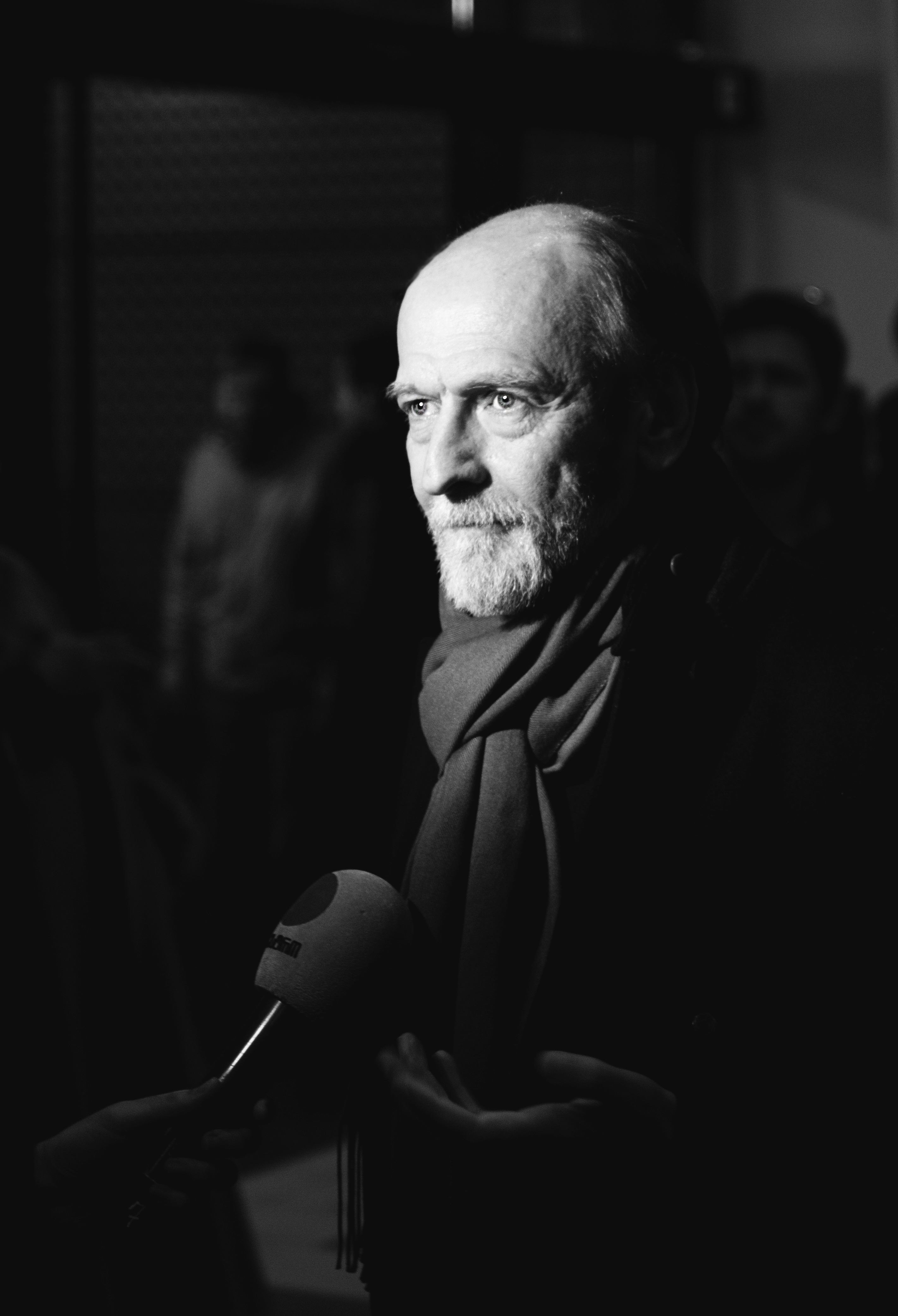 Tbilisi International Film Festival